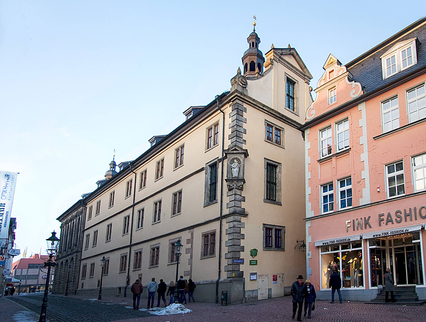 Päpstliches Seminar Fulda: Zwischen 1584 und 1732 entstand aus mehreren Gebäuden eine Vierflügelanlage, in der die Schule und ein Seminar der Jesuiten untergebracht waren. Mit einer Stiftung durch Papst Gregor XIII im Jahr 1584 wurde die finanzielle Ausstattung des Seminars gesichert. Fulda